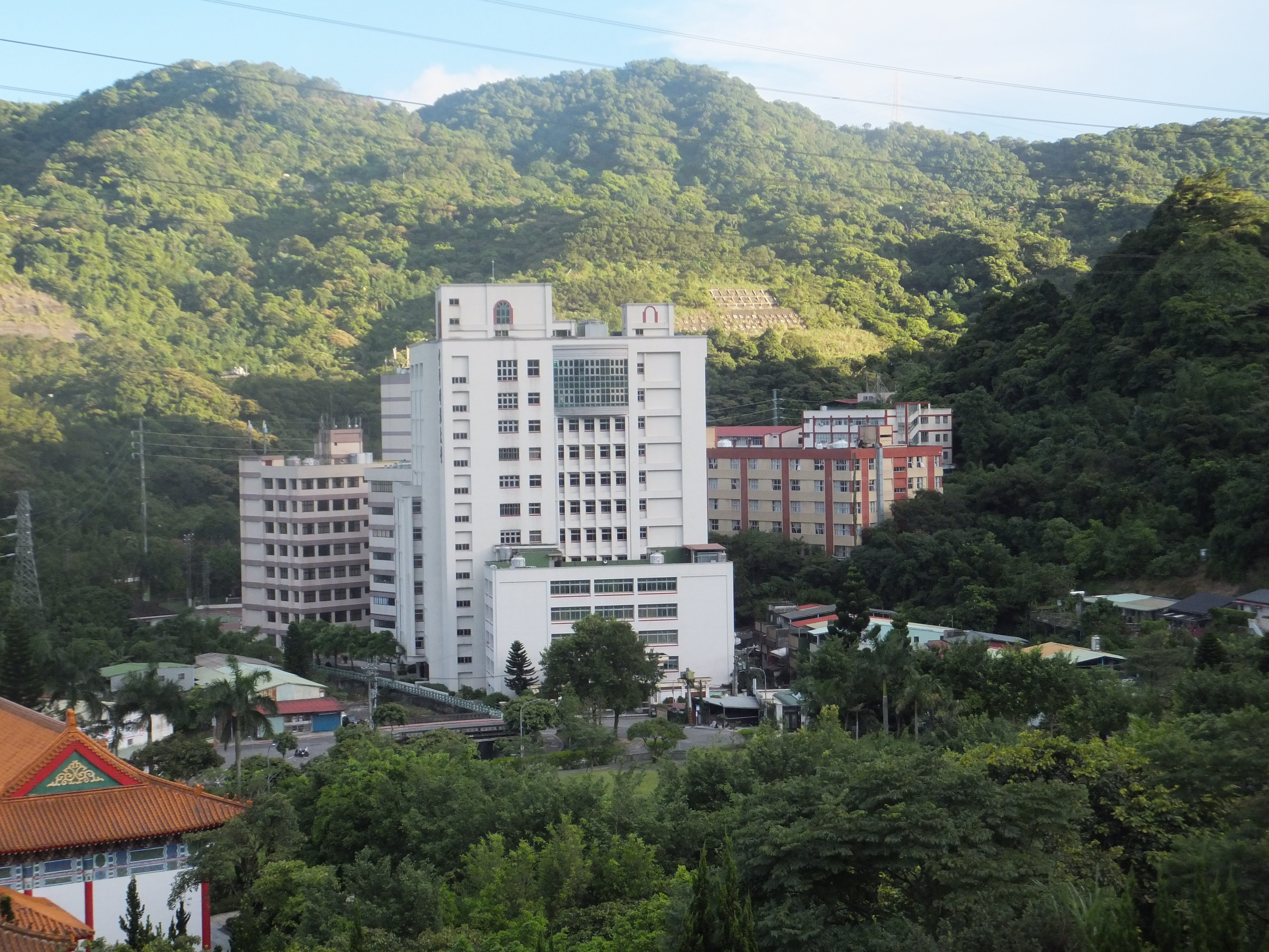 從臺北忠烈祠庭園俯望中華科技大學臺北校區全景。